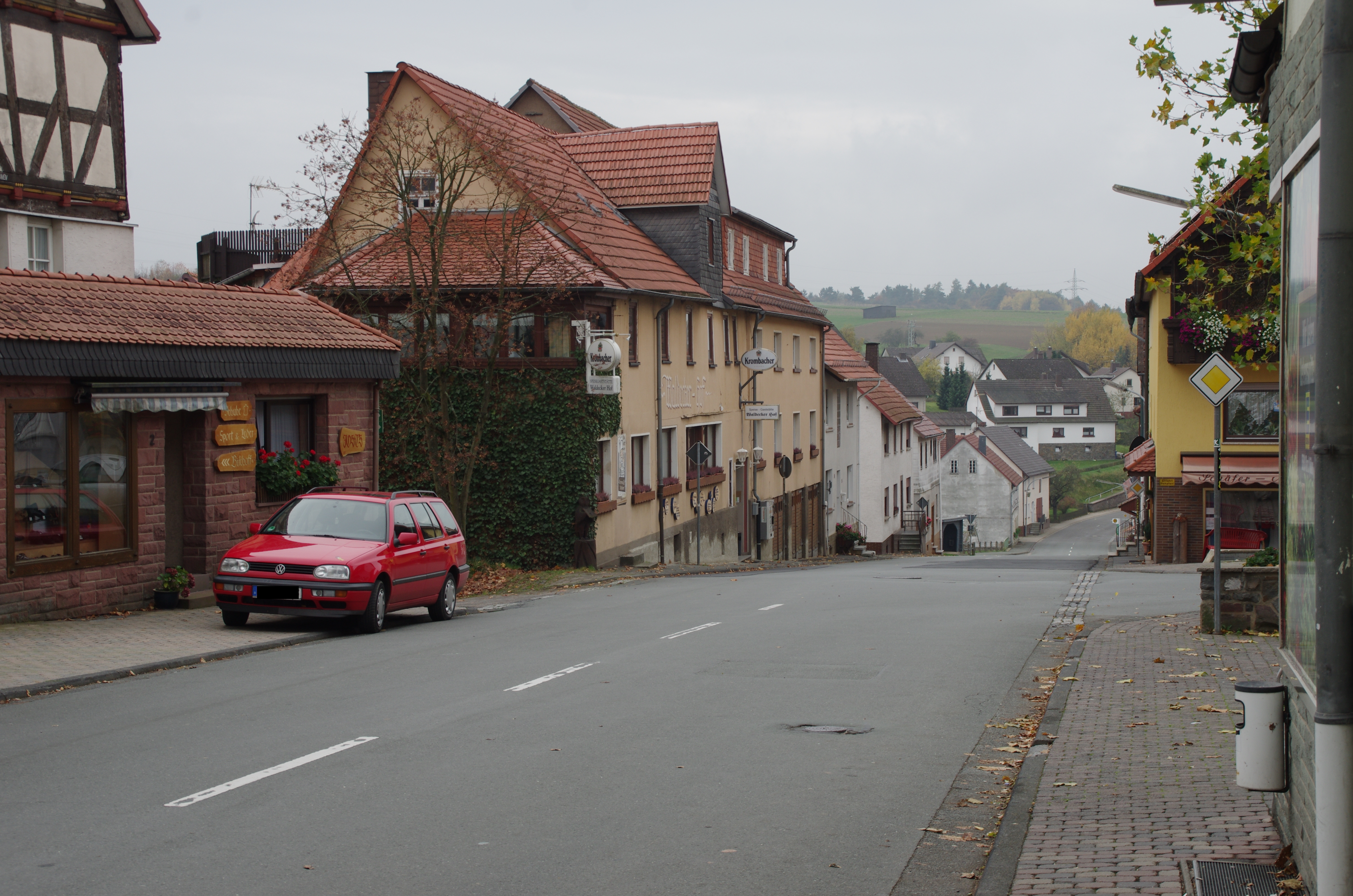 Frankenau in Hessen. Die Frankenberger Straße ist die Hauptstraße von Frankenberg.